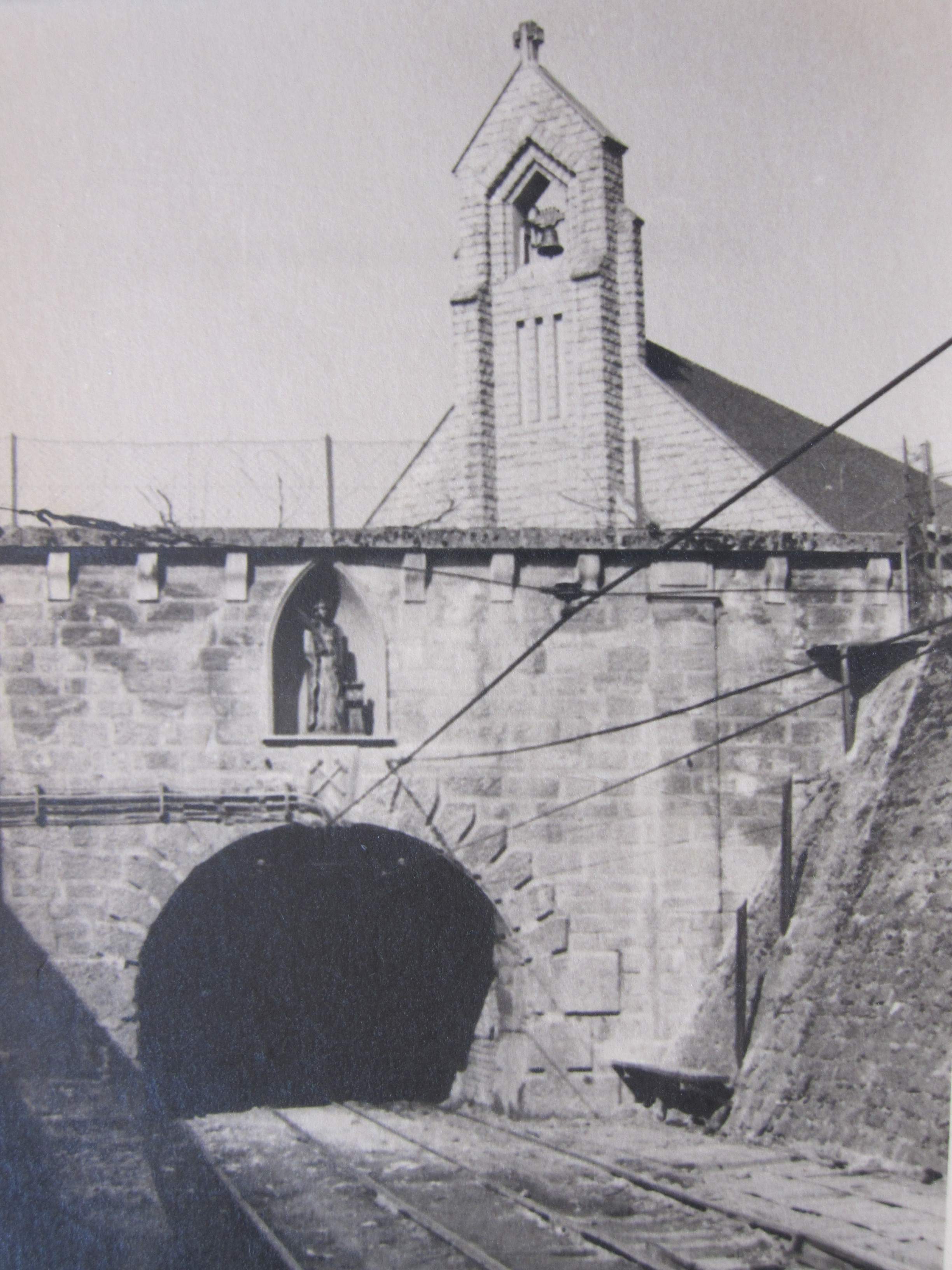 Photo ancienne - Mine Charles-Ferdinand - Entrange (Moselle)